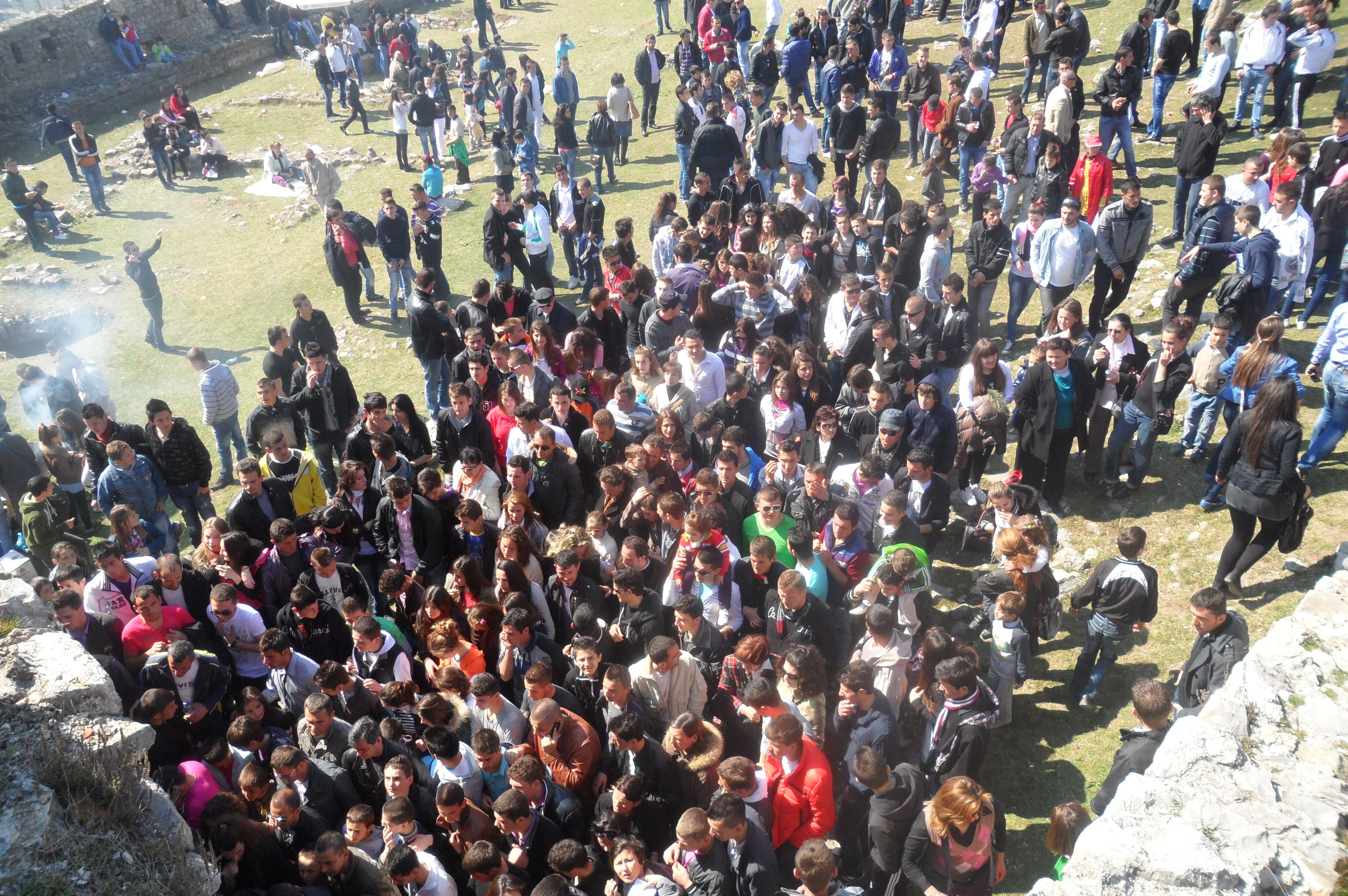 14 Marsi Dita e Veres-- Kalaja e Lezhës